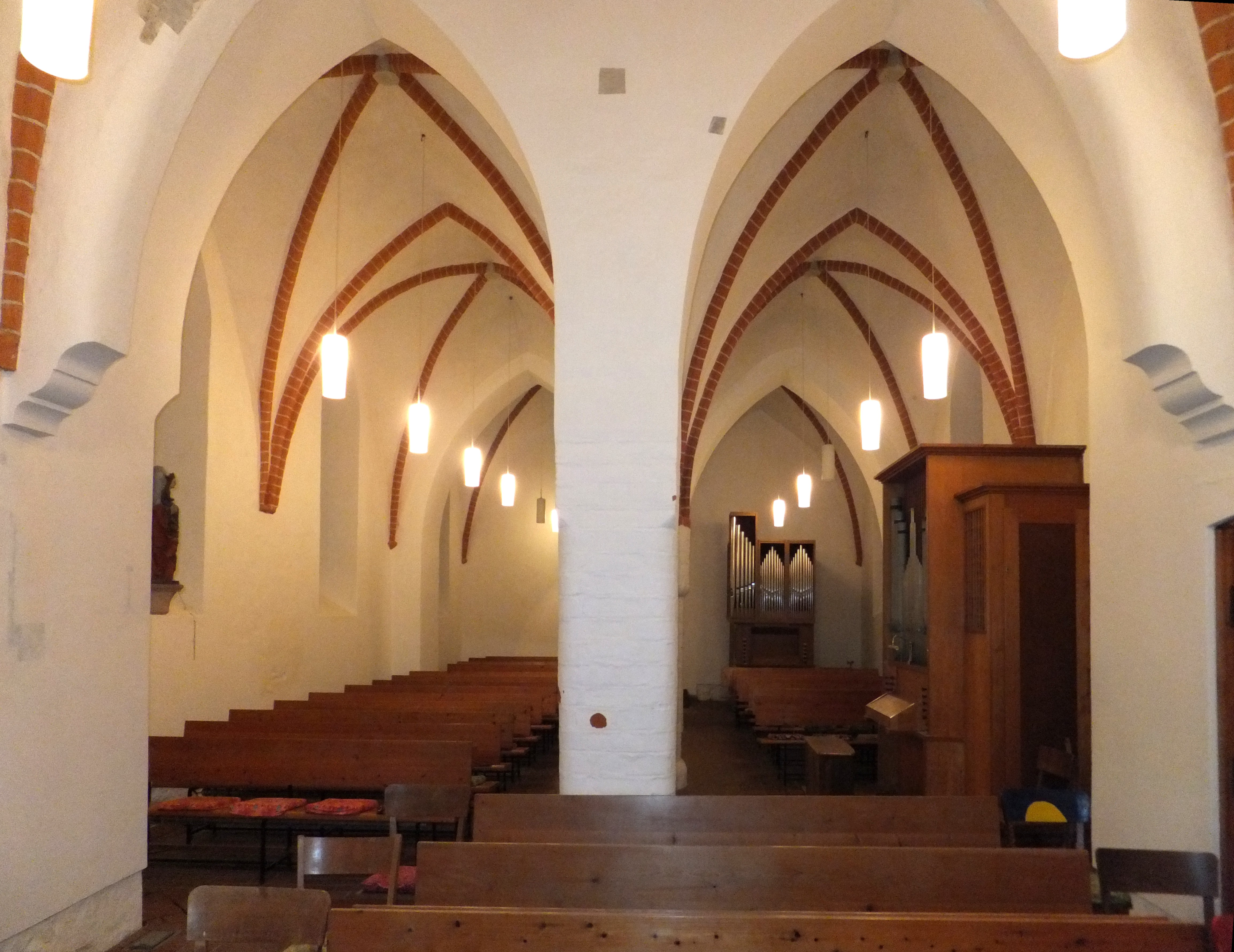 Dorfkirche Schwanebeck: Kirchenschiffe, Blick von der Apsis zum Eingang